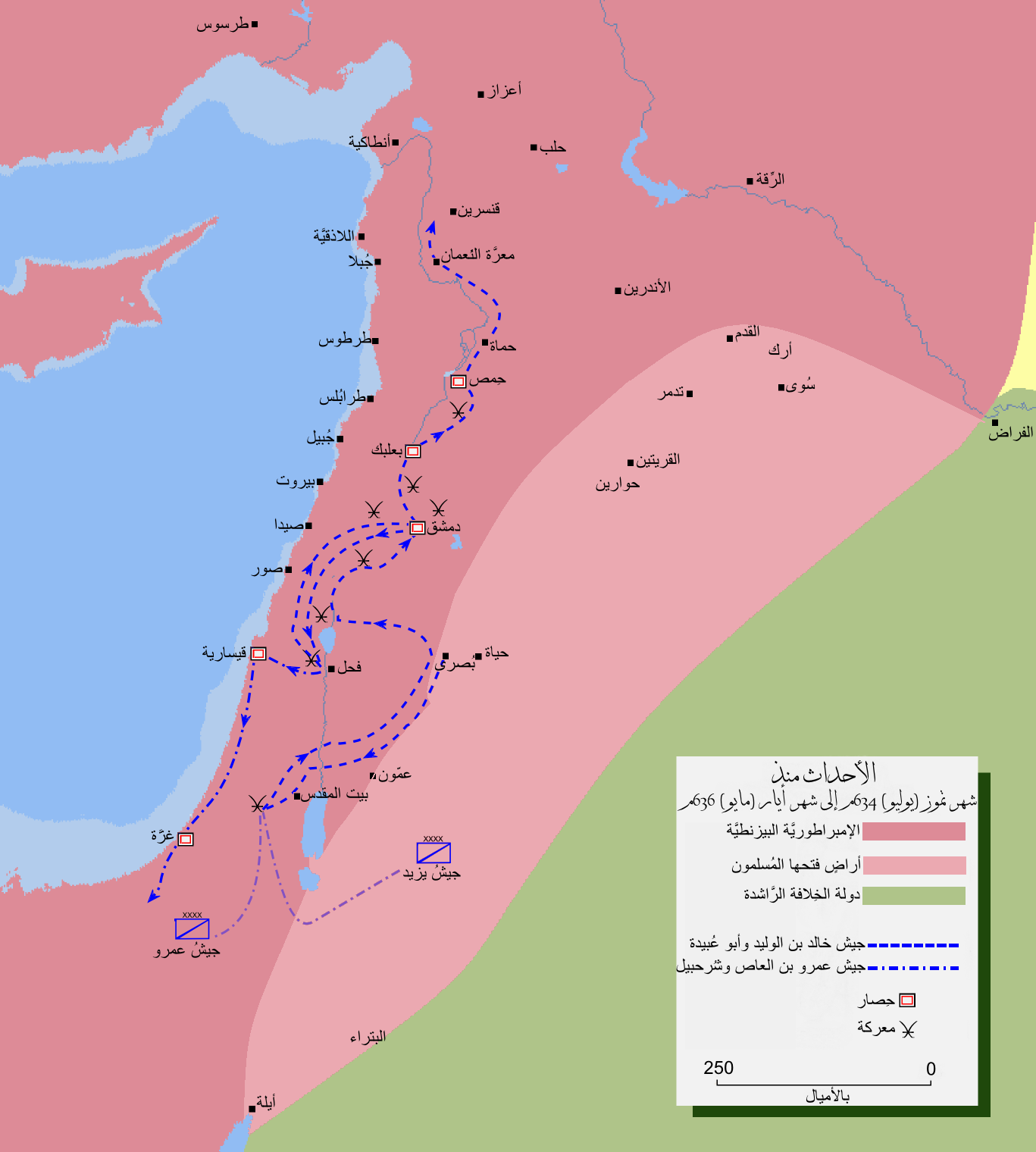 خارطة تُظهر فُتوحات المُسلمين للشَّام الوُسطى.